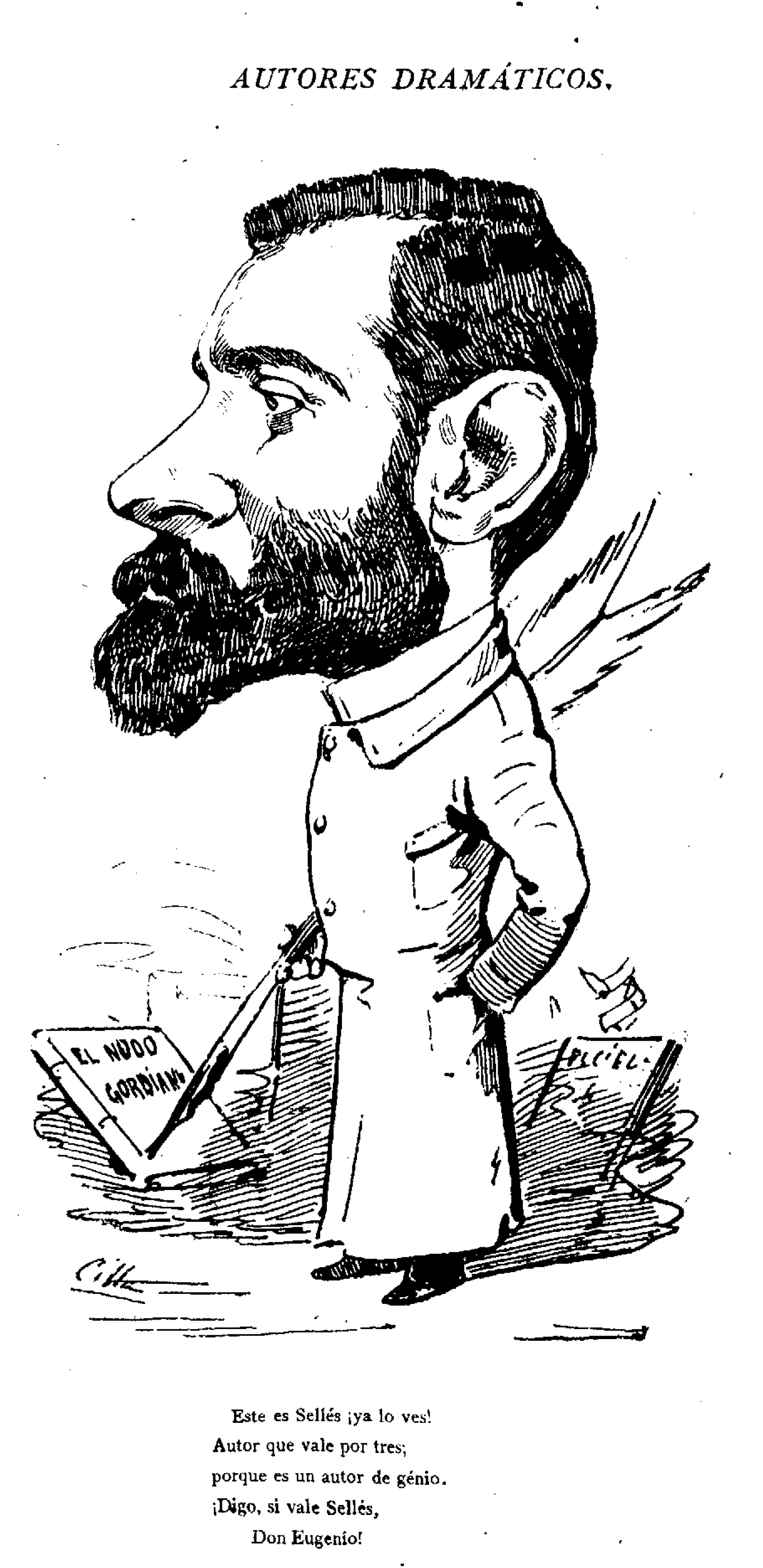 Eugenio Sellés.